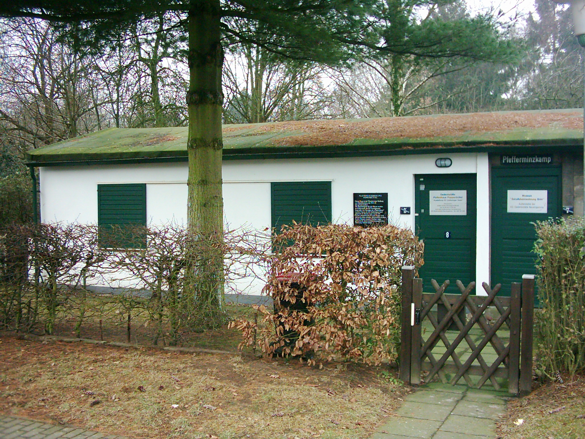 Gedenkstätte in Hamburg, Germany (Poppenbüttel).